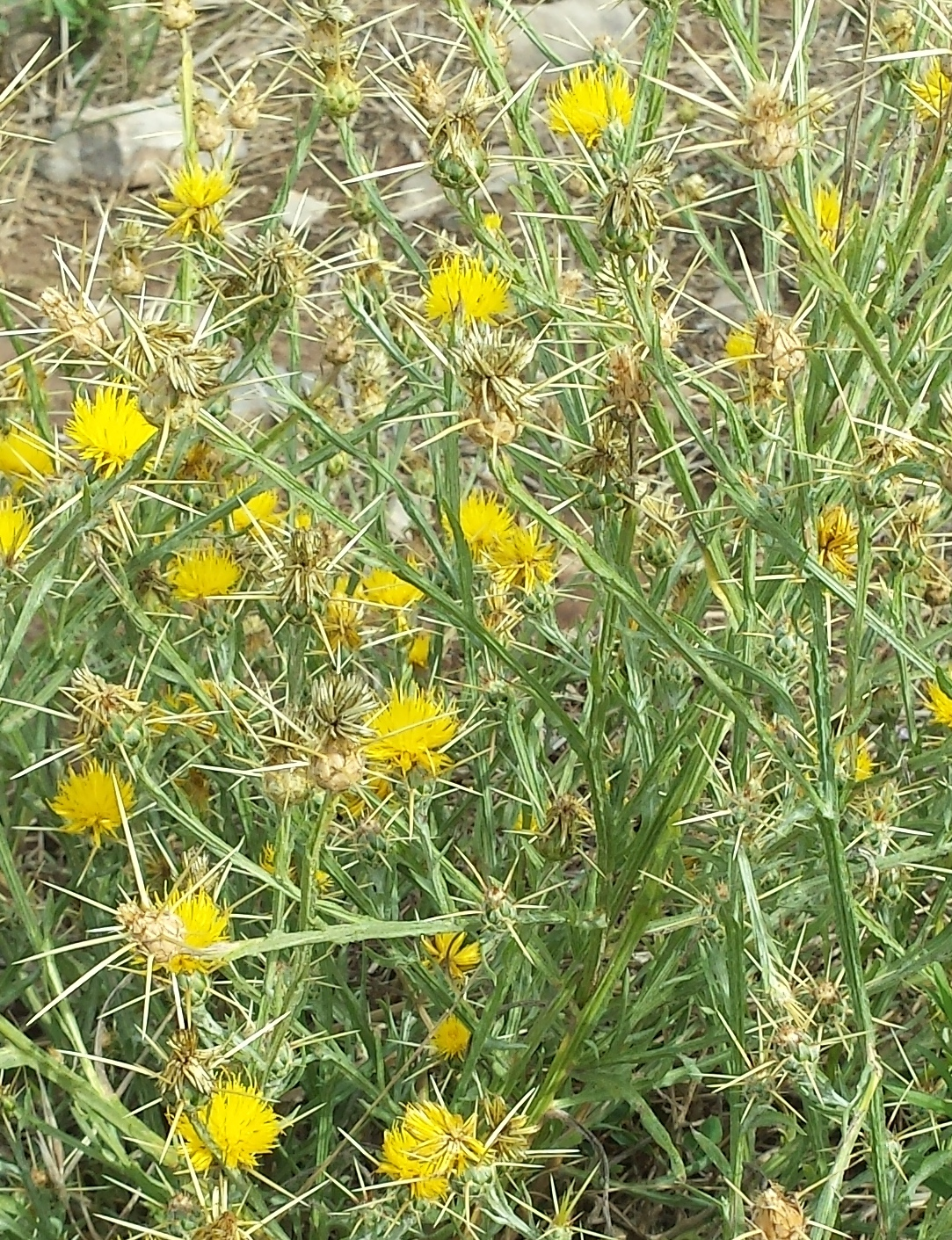 Centaurea solstitialis a la Serra de Castelltallat, Bages 830 m snm